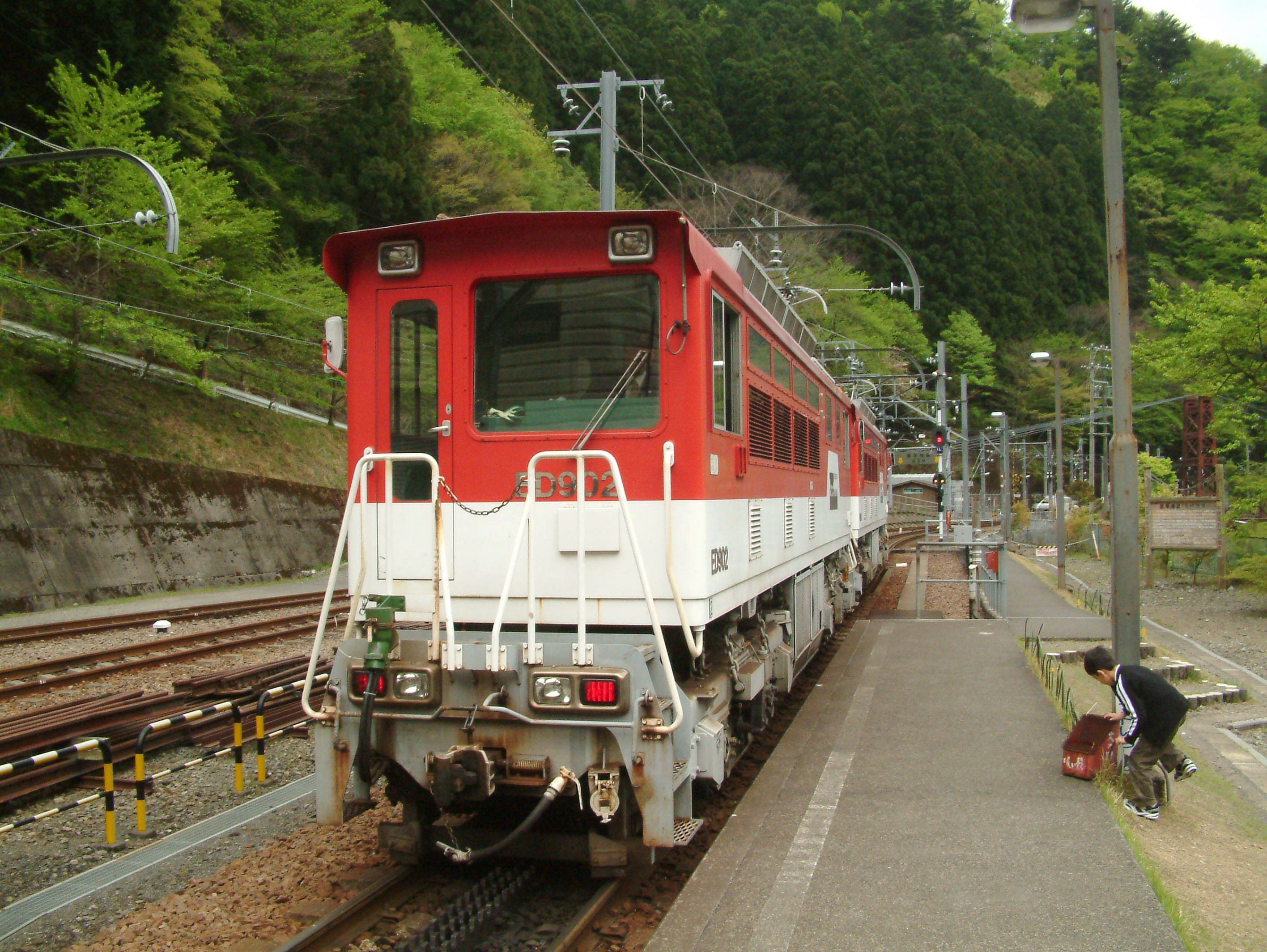 Locomotives de pousse sur la section a crémaillère de la ligne Oigawa Ikawasen [JP] Photo: Utilisateur:Serow